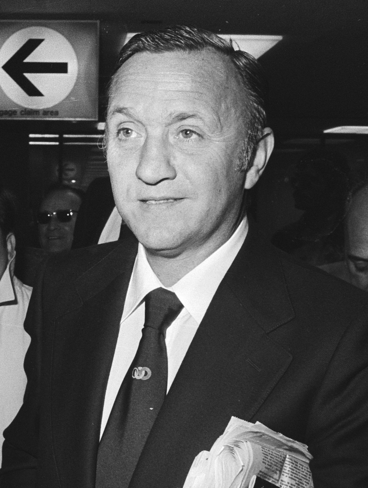 Elftal Espagnol op Schiphol i.v.m. wedstrijd tegen Feijenoord; Espagnol-trainer Santamaria